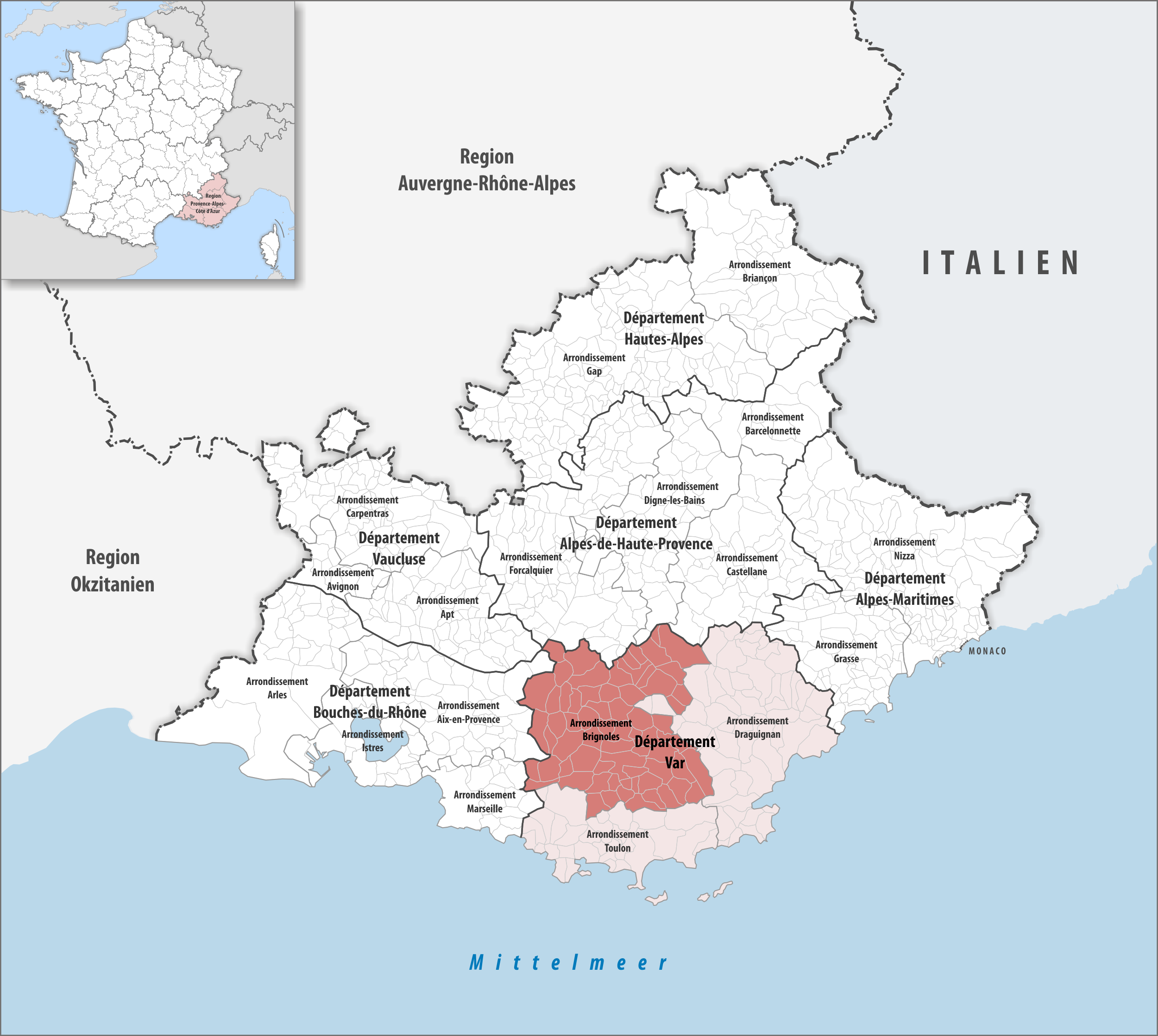 Lage des Arrondissements Brignoles